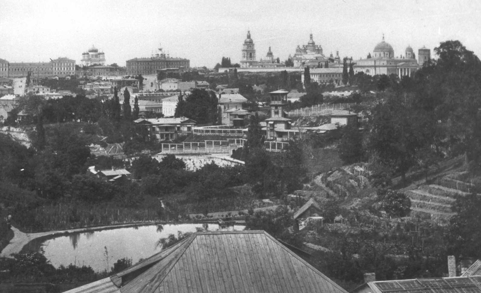 Панорама усадьбы Меринга (1870-е годы)